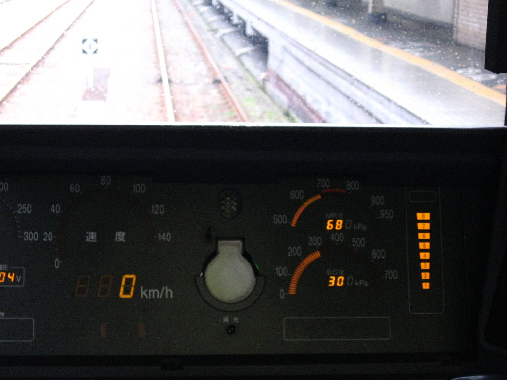 207系1000番台の運転台(京都にて。)